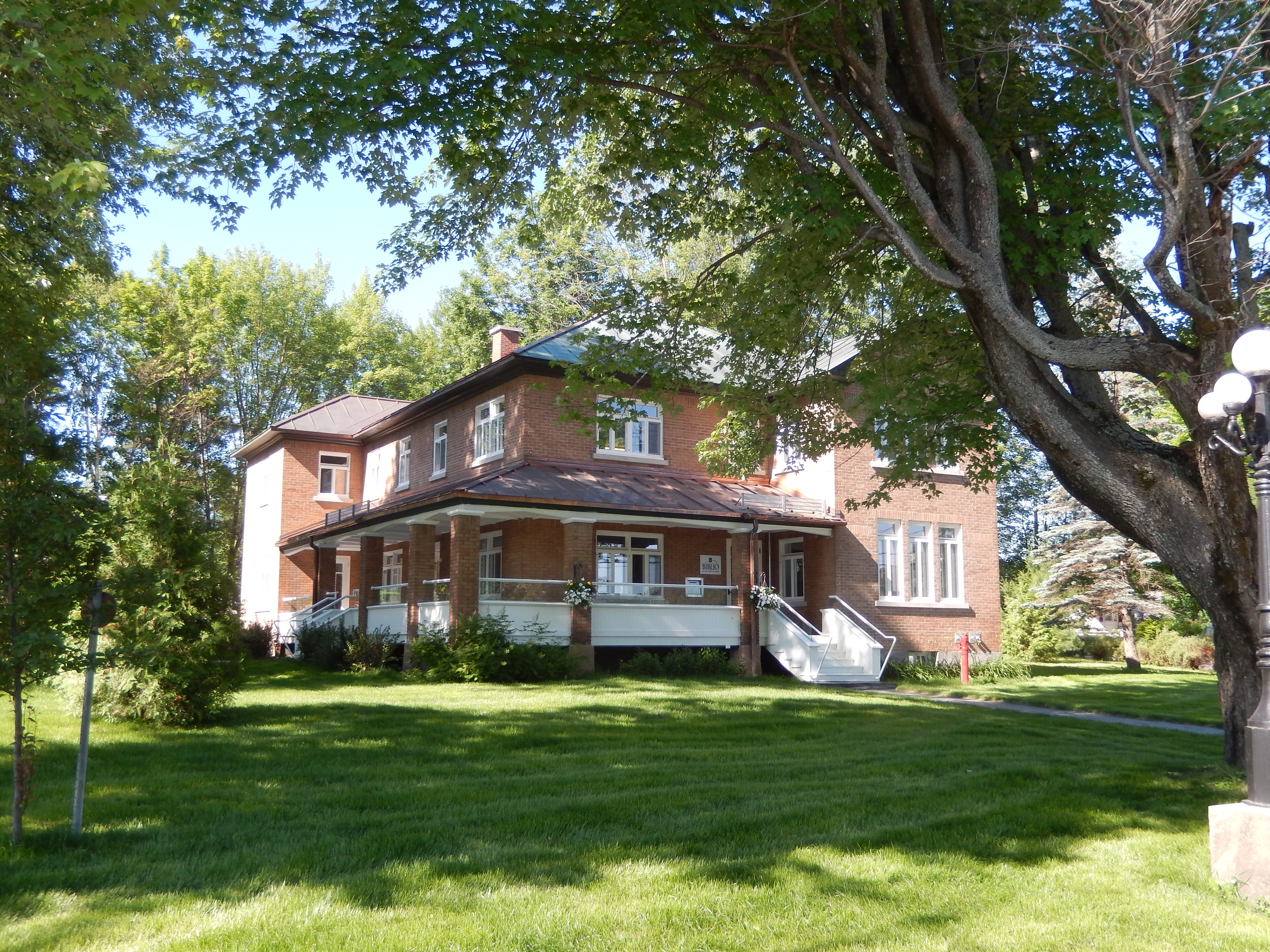 Bibliothèque municipale de Dégelis, citée immeuble patrimoniale en 2009